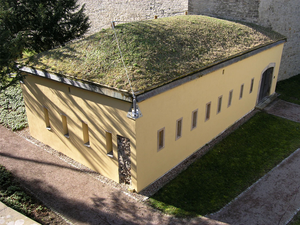 Grabenkaponniere II (errichtet 1827)